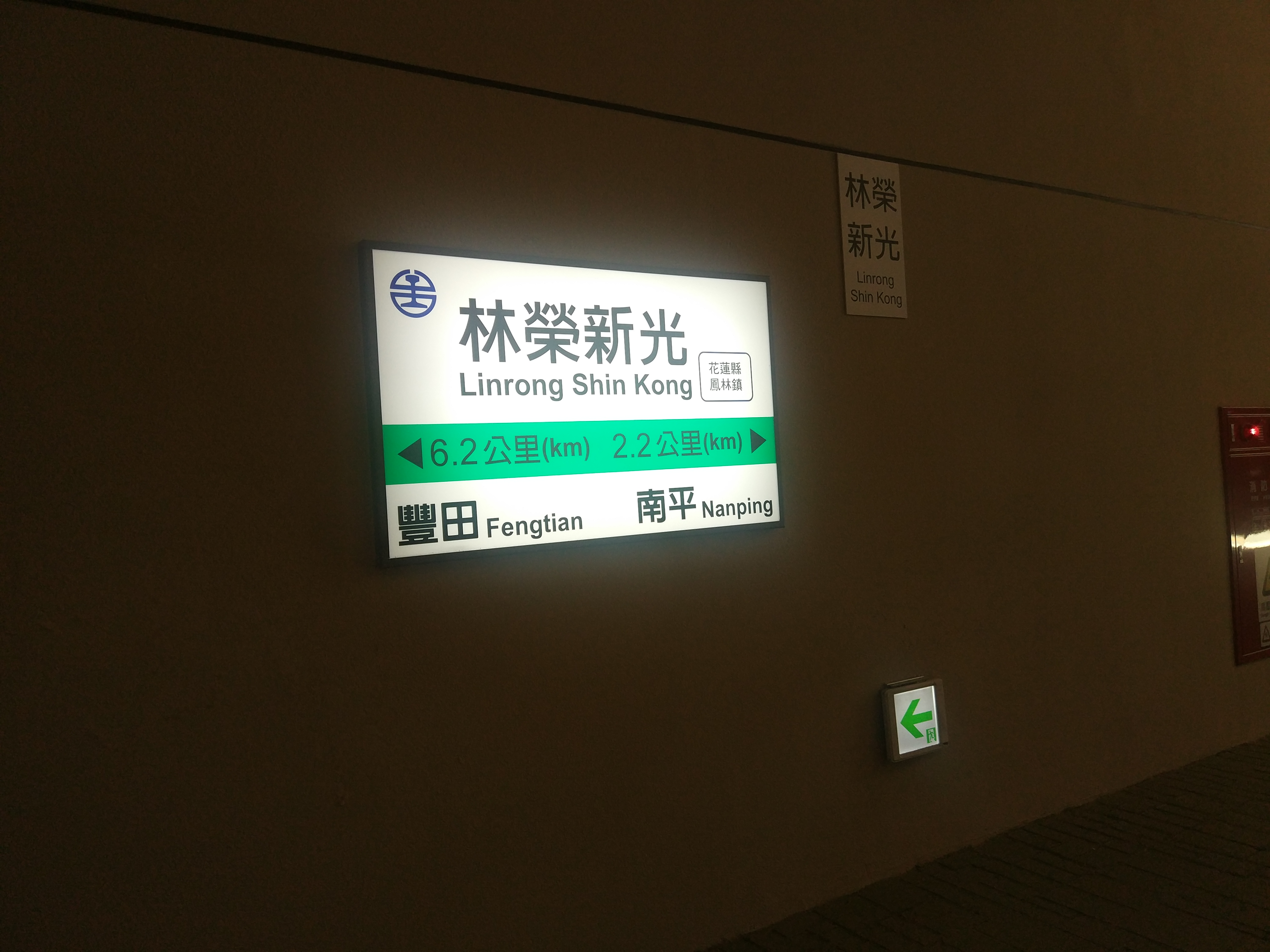 中文（台灣）: 台鐵林榮新光車站指示牌